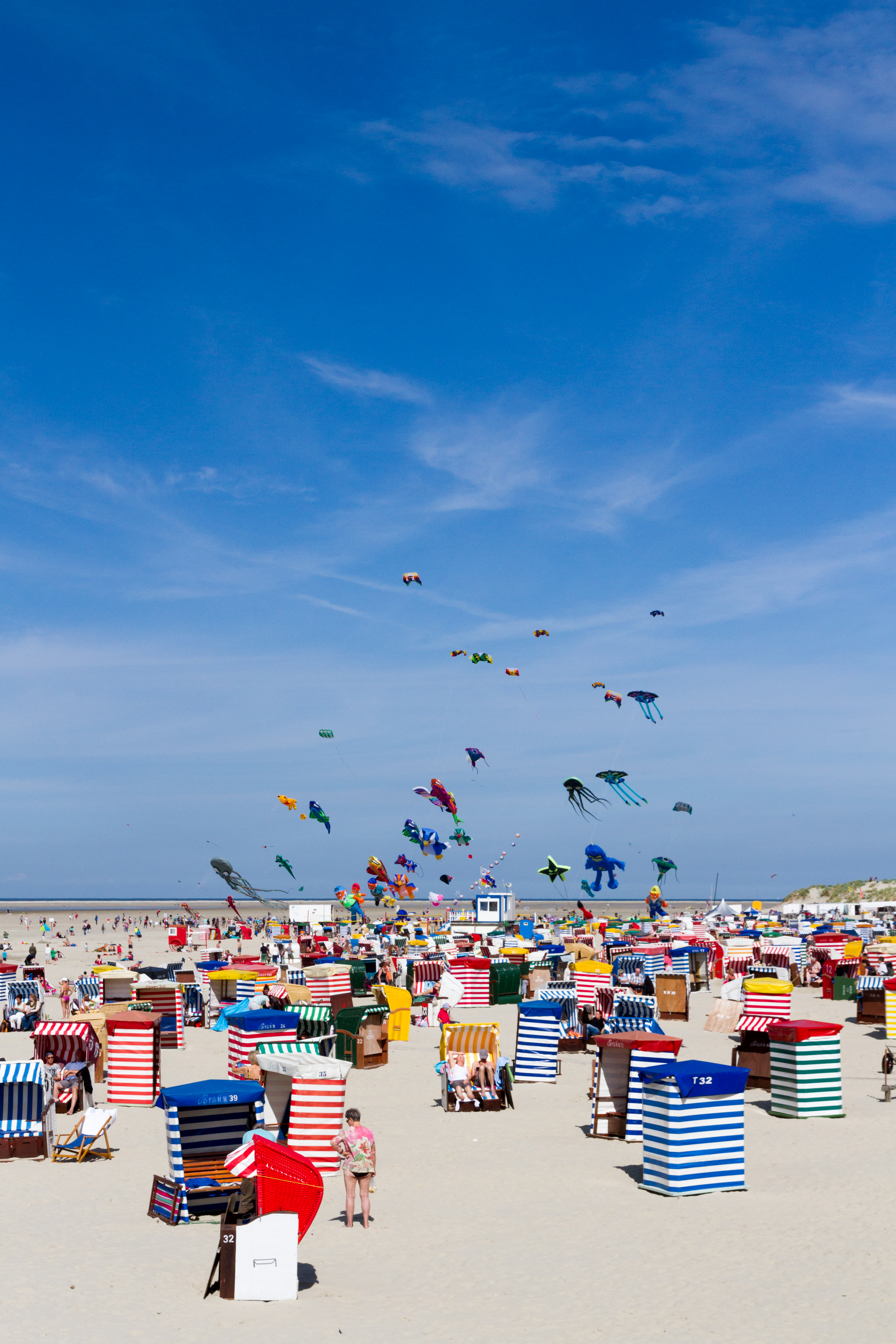 Drachenfest 2015 am Hauptstrand